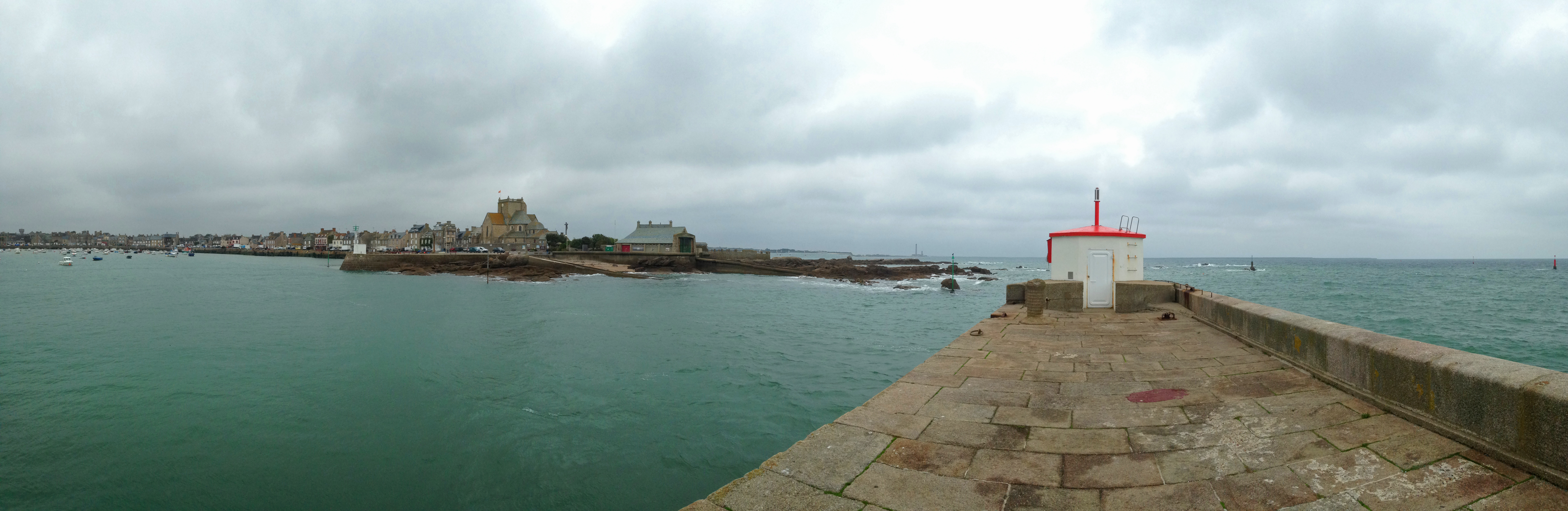 Le port de Barfleur depuis la jetée